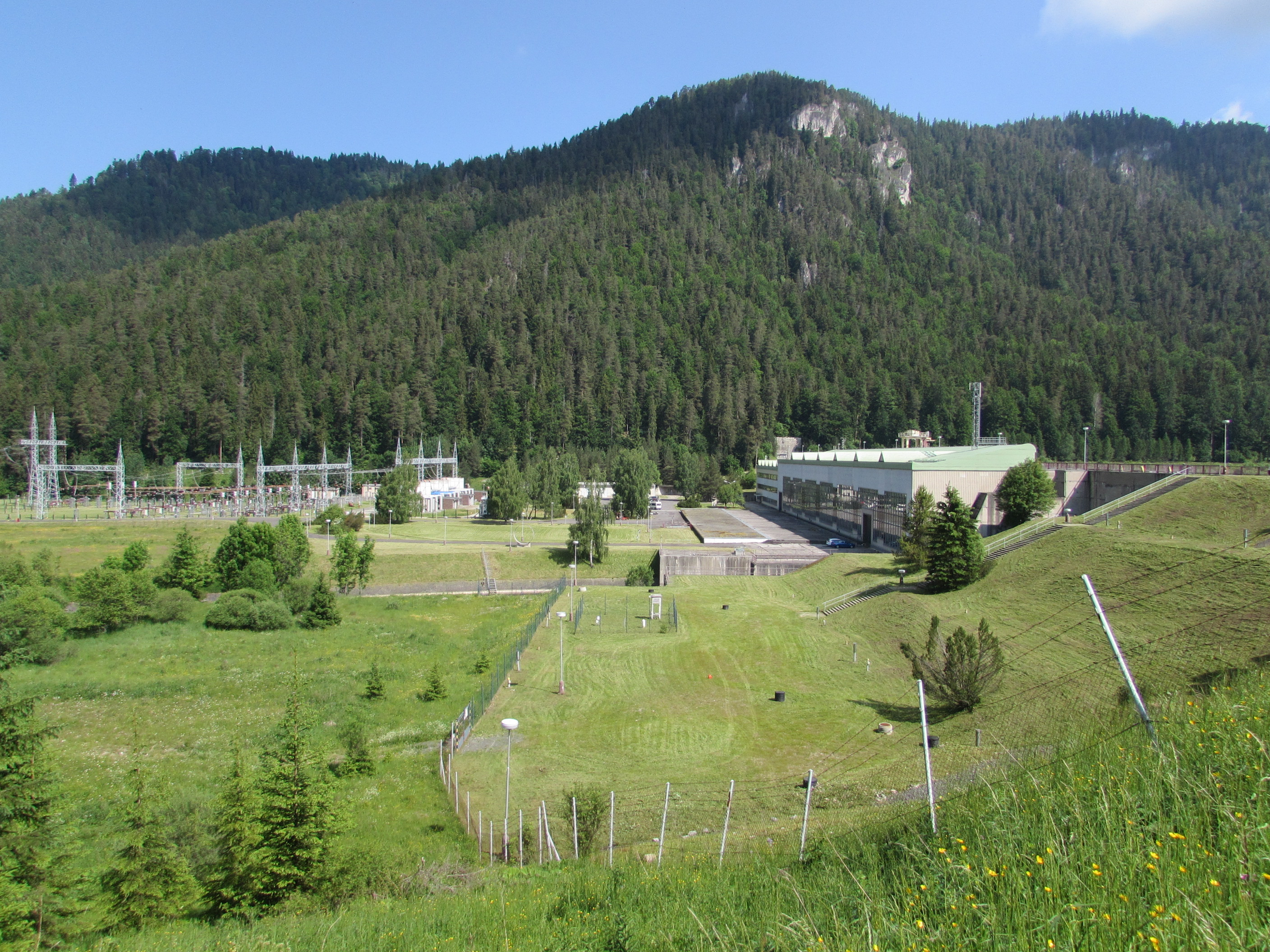 die Staumauer bzw. das Wasserkraftwerk des Čierny Váh-Stausees